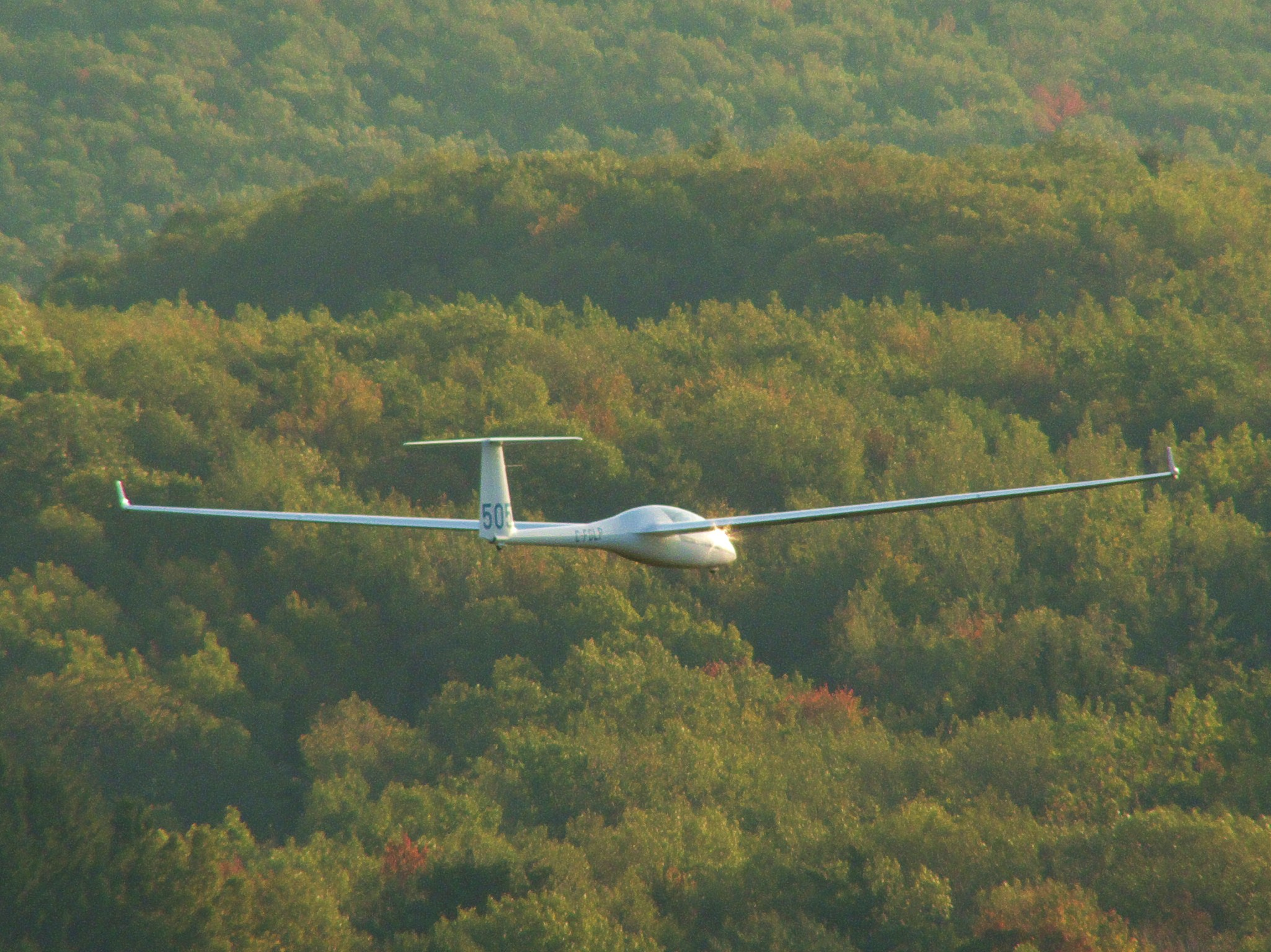 DG-505 glider ridge soaring in Pennsylvania